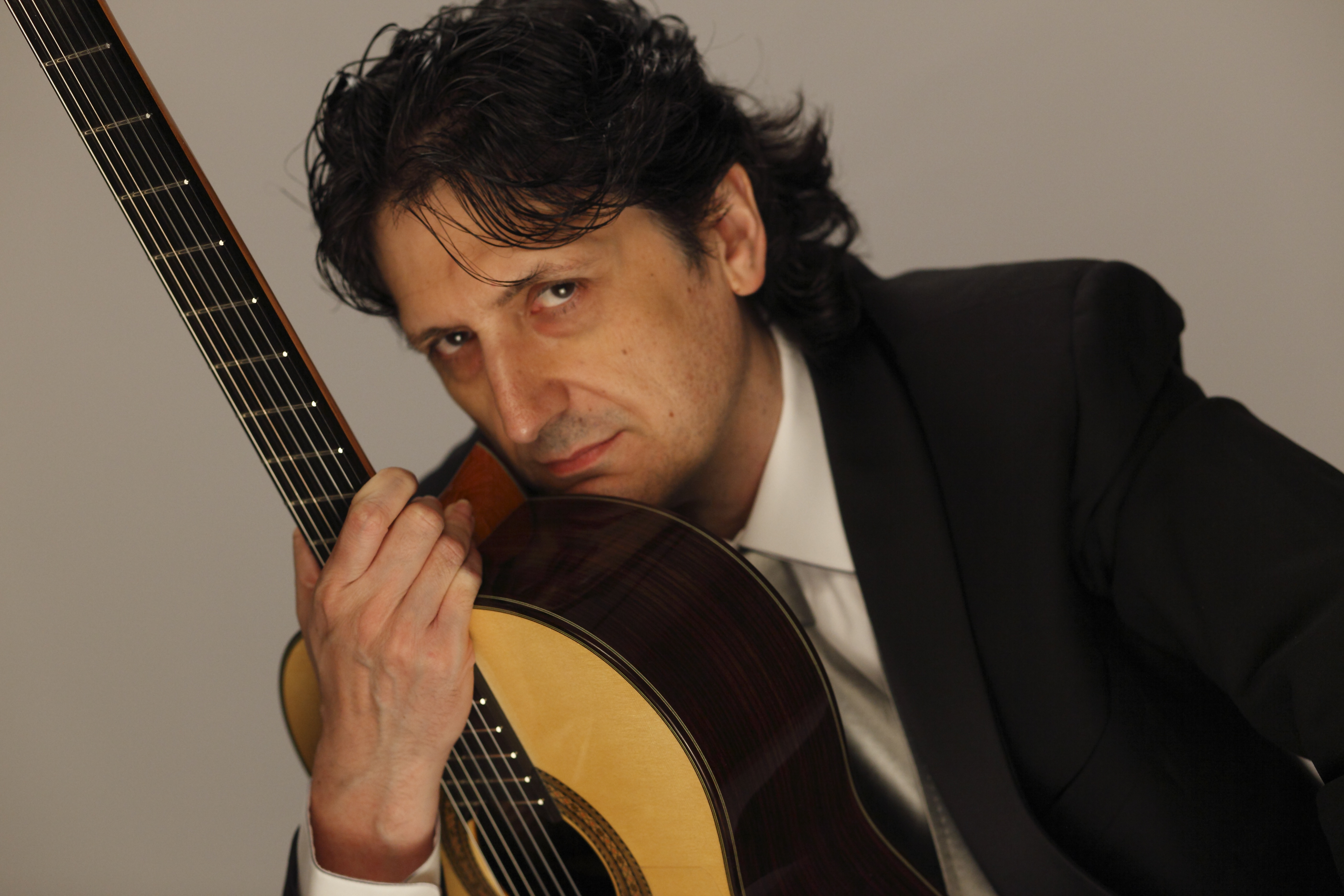 Fotografía de Cañizares